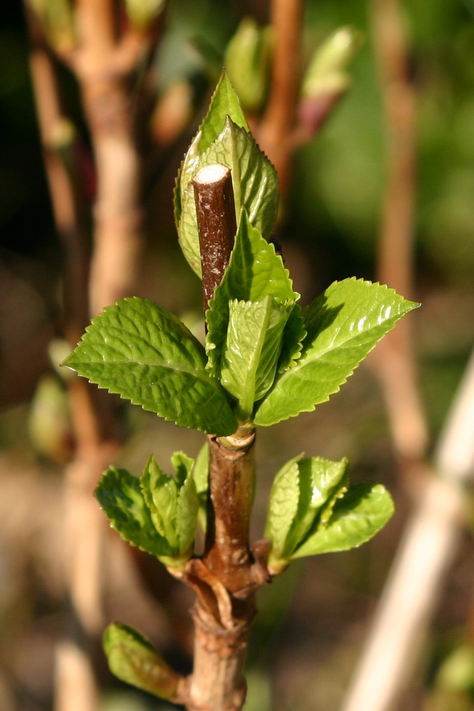 Hortenseschëtz.